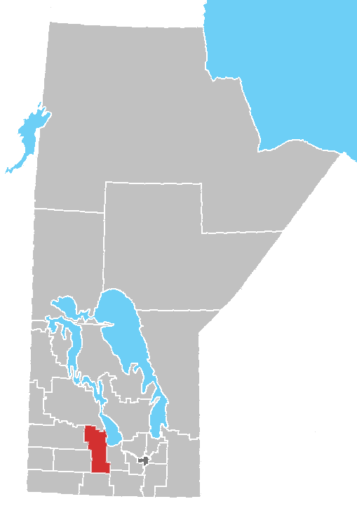 Manitoba census area No. 8